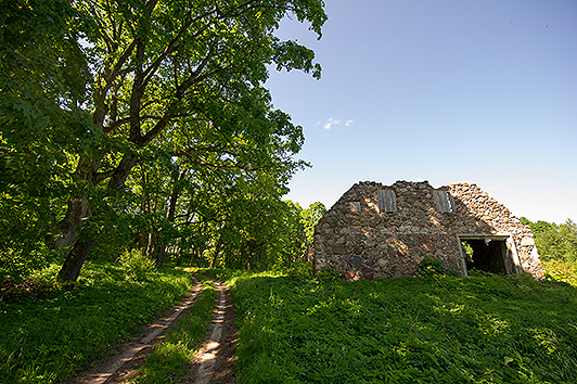 Ilzenbergo dvaro ansamblio statinys: arklidės. Iki 2012 metų rekonstrukcijos.